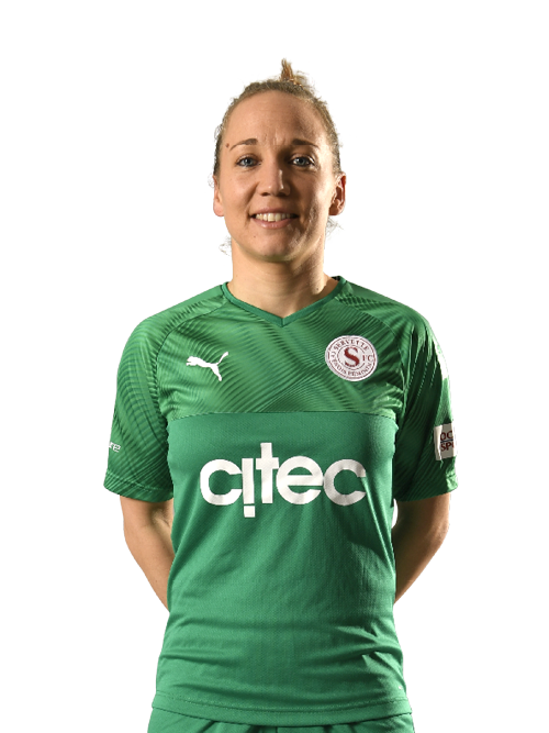 Photo portrait et photo licence de Gaelle Thallmann